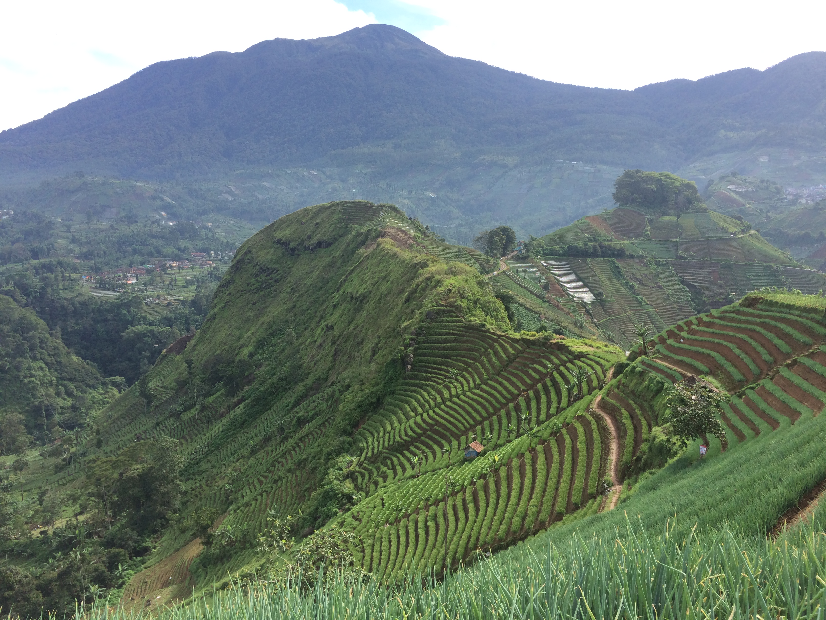 Lembah Panyaweuyan, Argapura, Kabupaten Majalengka